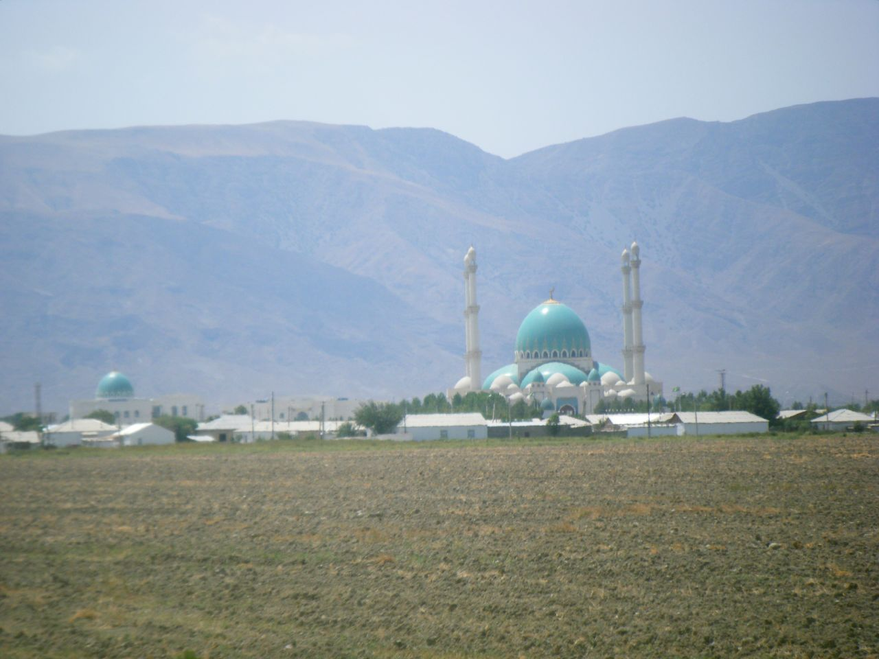 Geok-Tepe02